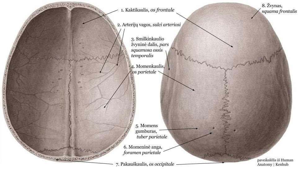 Kaukolės vaizdas iš viršaus ir apačios. Dalys: 1. Kaktikaulis, Os frontale 2. Arterijų vagos, Sulci arteriosi 3. Smilkinkaulio žvyninė dalis, Pars squamosa ossis temporalis 4. Momenkaulis, Os parietale 5. Momens gumburas, Tuber parietale 6. Momeninė anga, Foramen parietale 7. Pakauškaulis, Os occipital 8. Žvynas, Squama frontalis